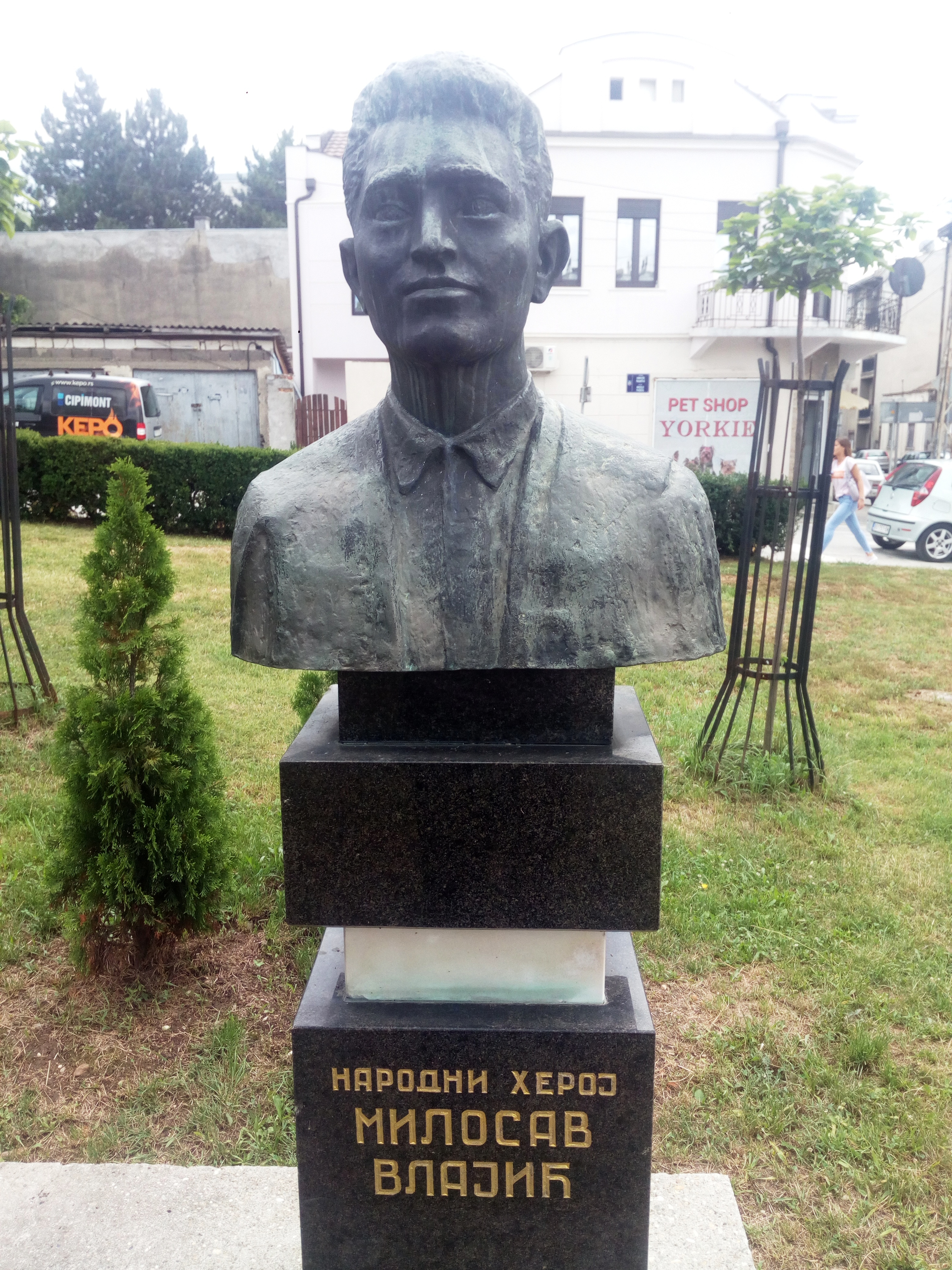 Спомен-биста Милосава Влајића у Младеновцу